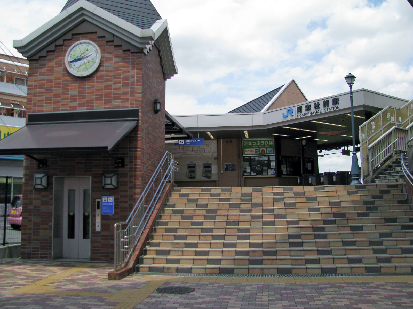 西日本旅客鉄道（JR西日本）片町線（学研都市線）同志社前駅